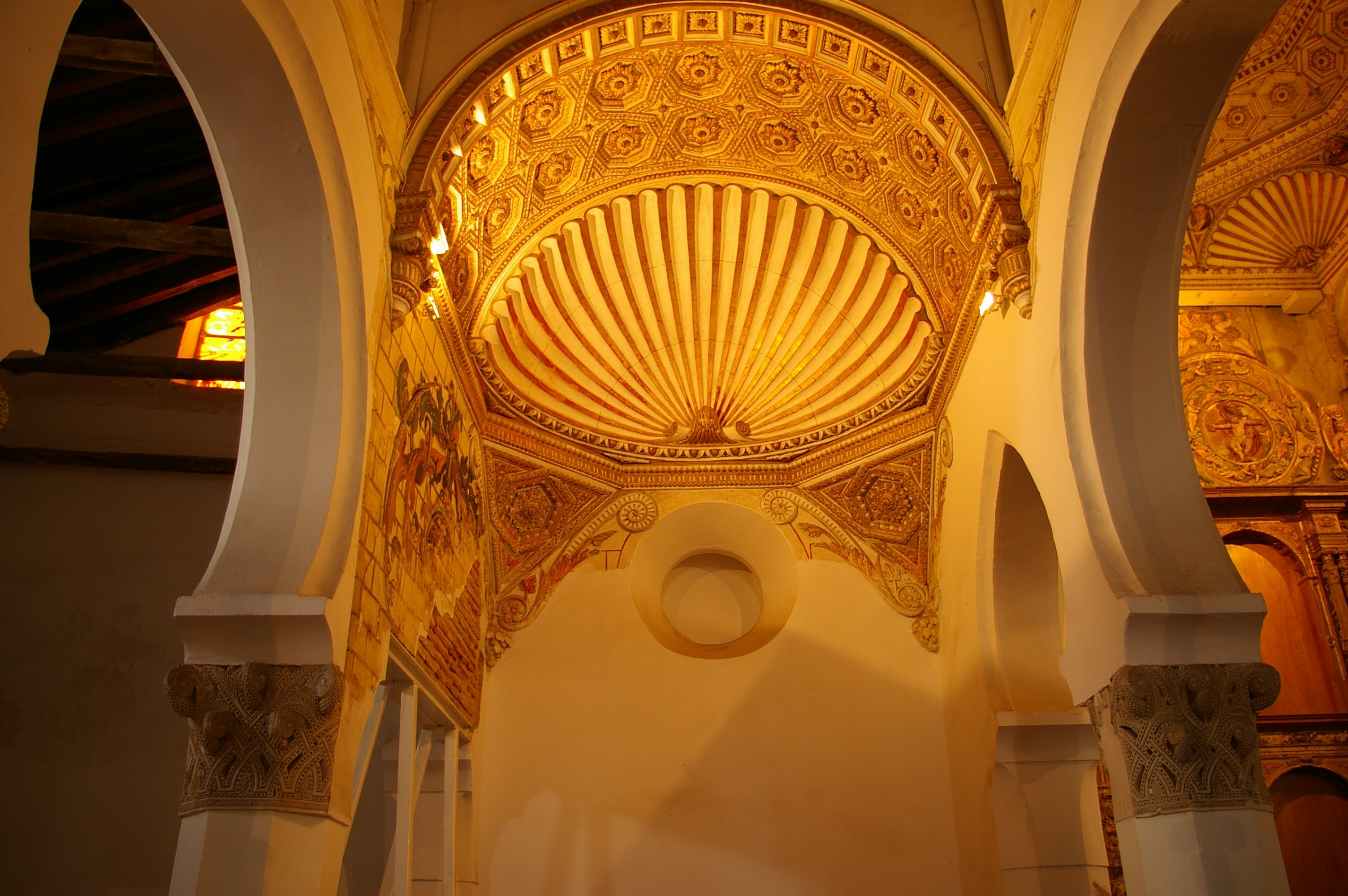 Synagogue Santa Maria la Blanca